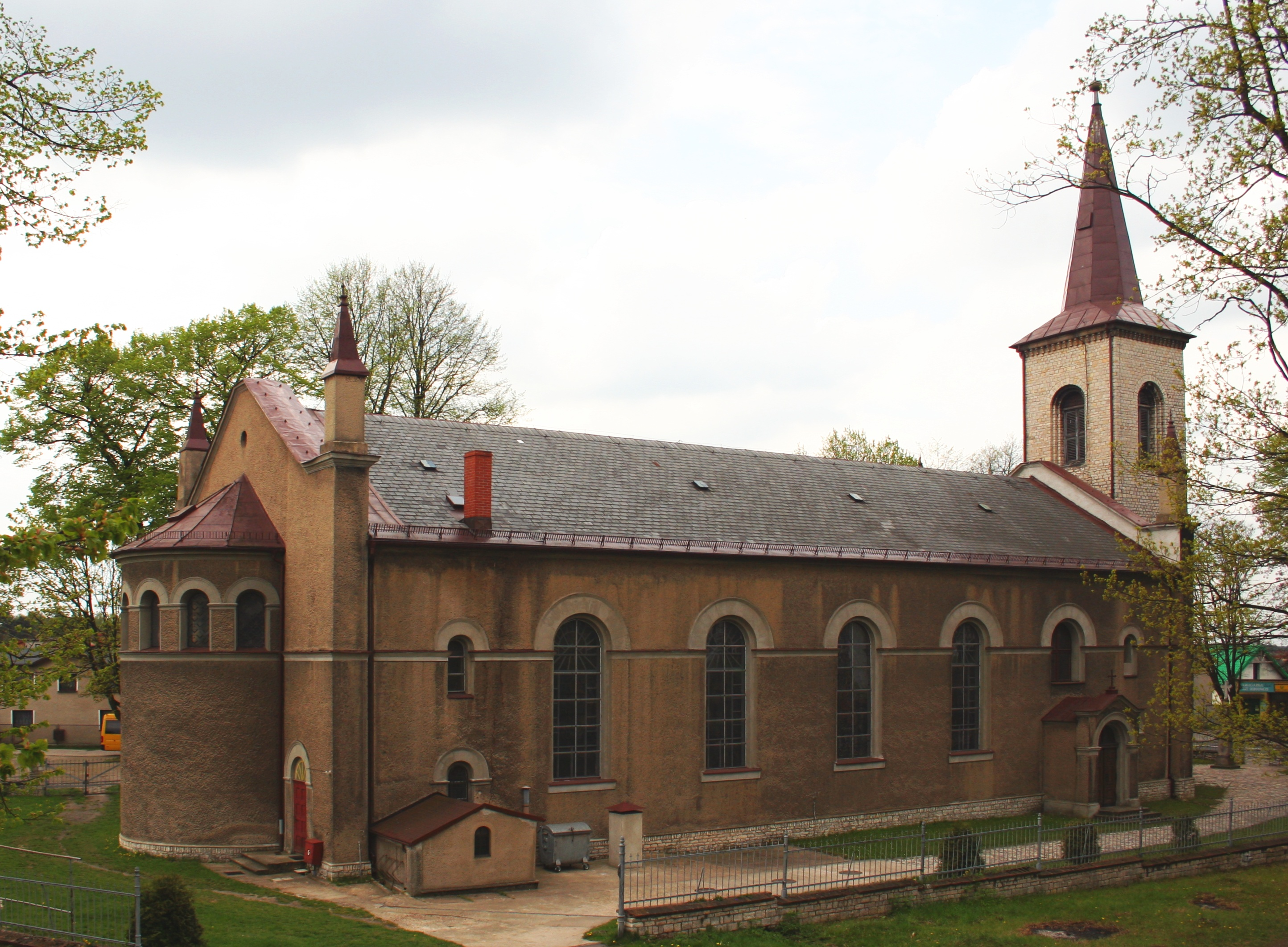 kościół Narodzenia NMP w Żyglinie (Miasteczko Śląskie), Polska, województwo śląskie, powiat tarnogórski